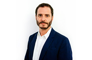 Hernán Larraín, abogado chileno.